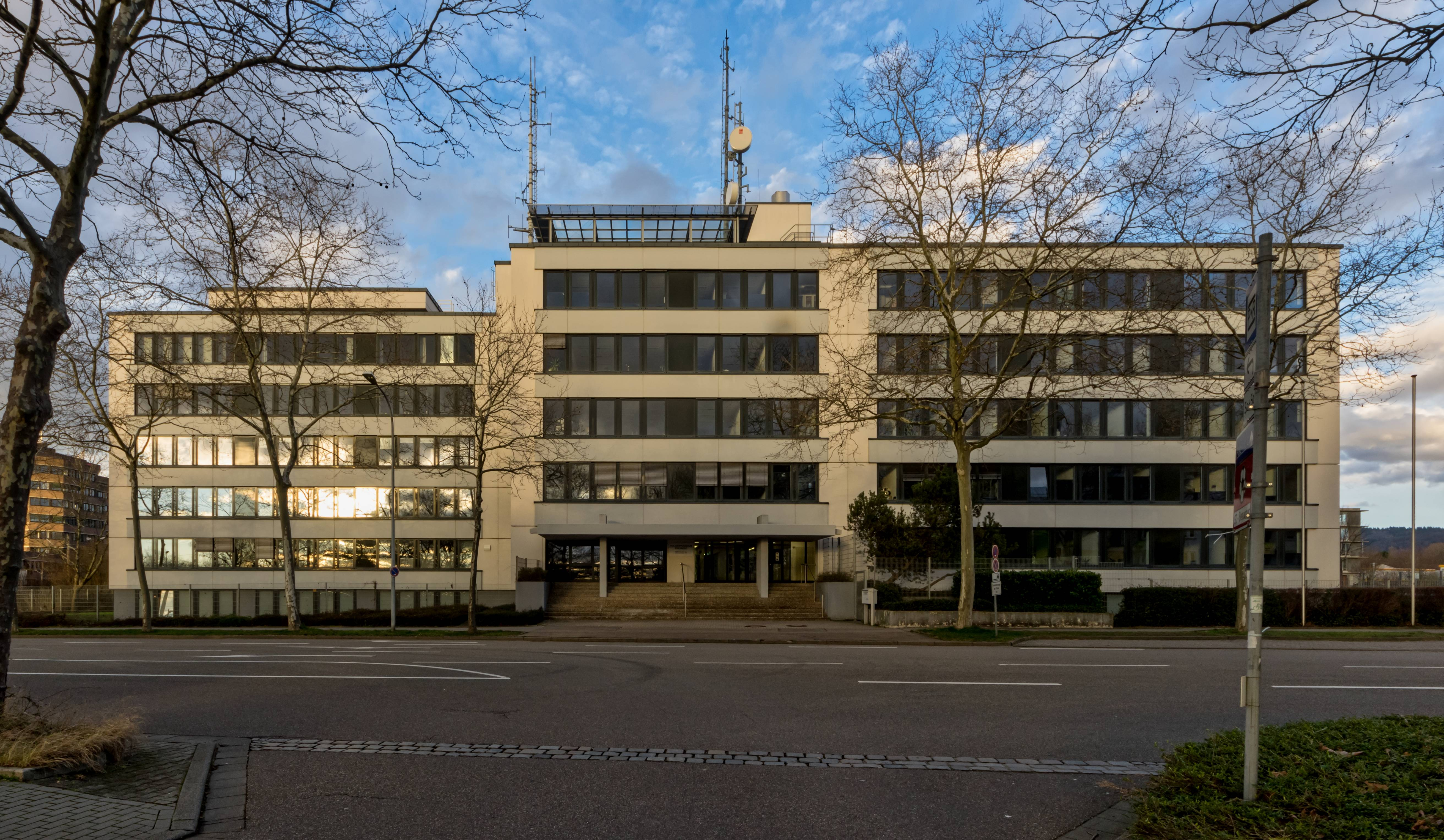 Bilder aus Freiburg im Breisgau, Bissierstraße